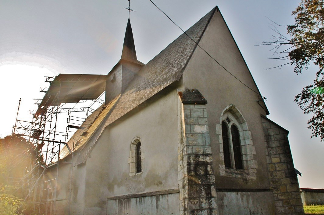 église St Léger